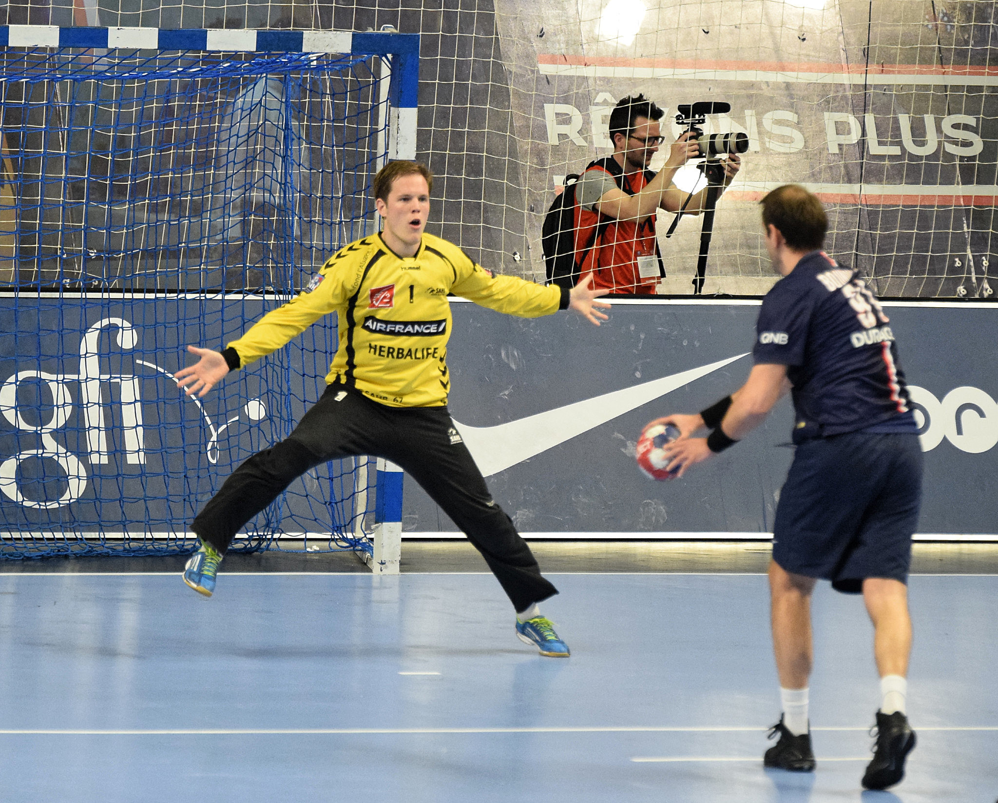 Rencontre de la 20e journée de LNh entre le PSG Handball et Sélestat. A Coubertin, le 08 avril 2015.